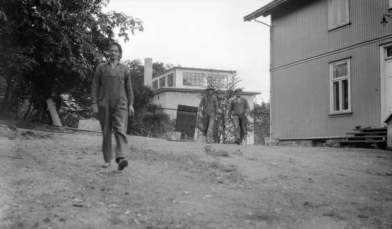 Ekely, Edvard Munchs eiendom. Det bevarte atelieret i bakgrunnen